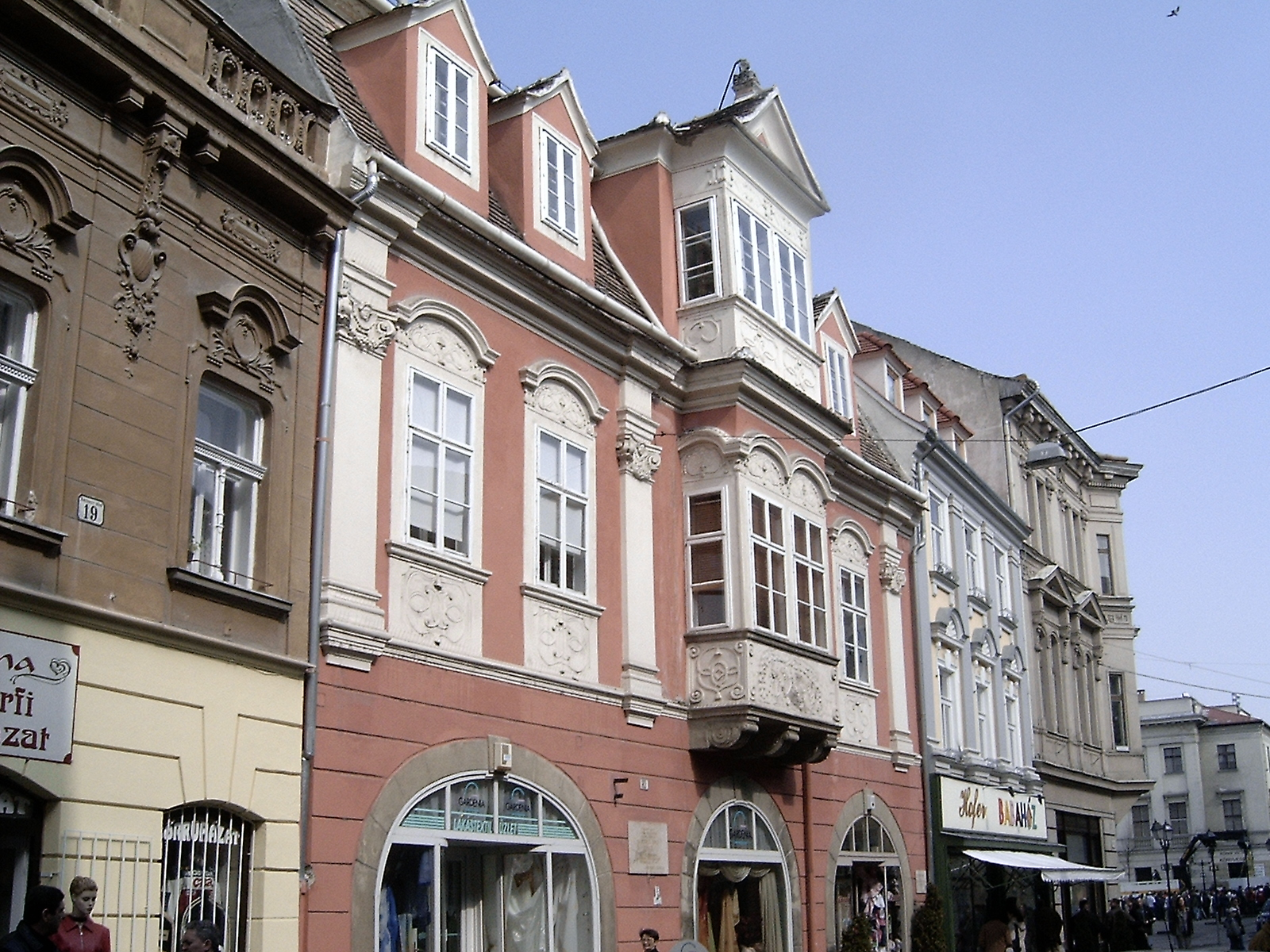 A Rozália-ház Győrött